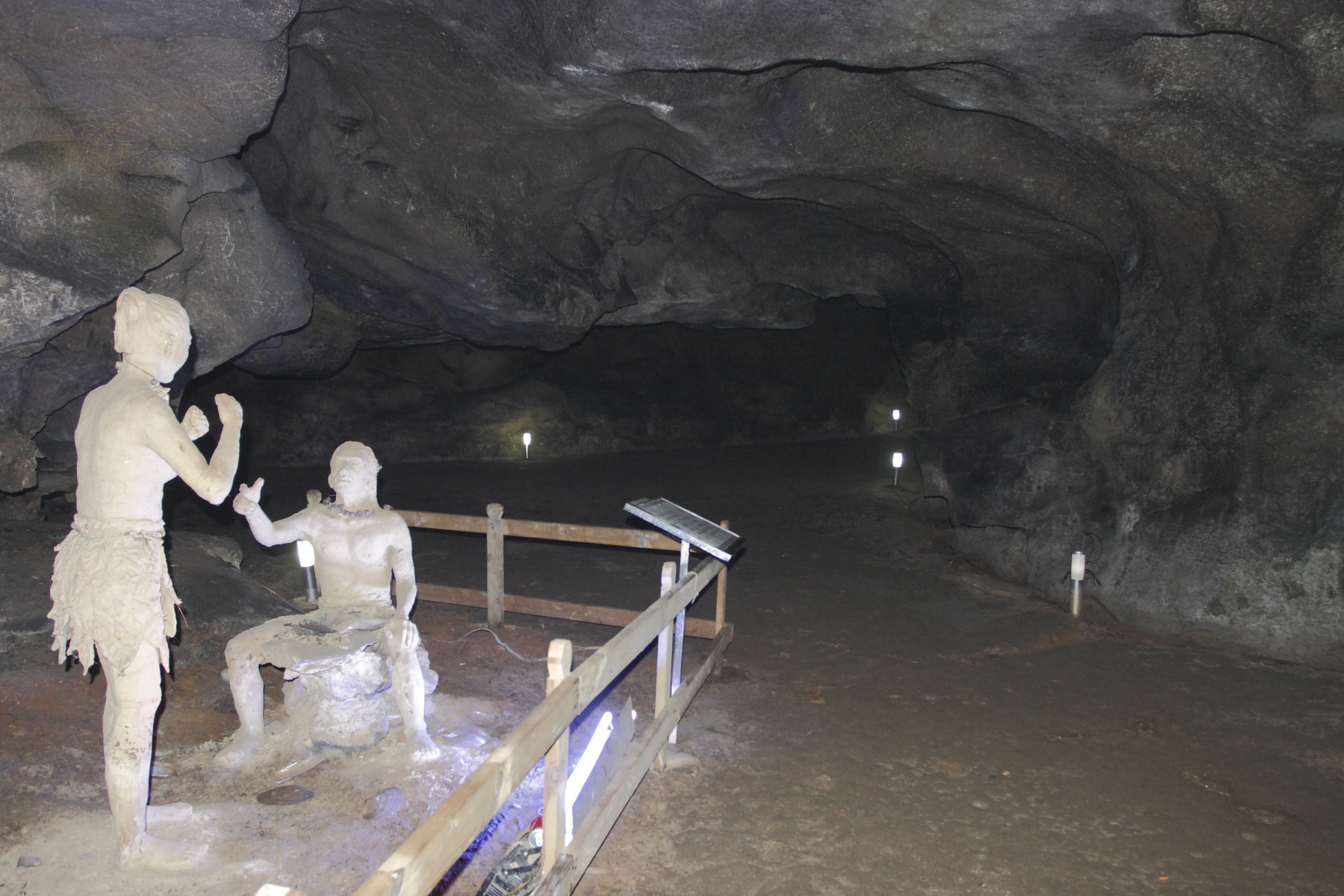 江西万年仙人洞遗址，全国重点文物保护单位